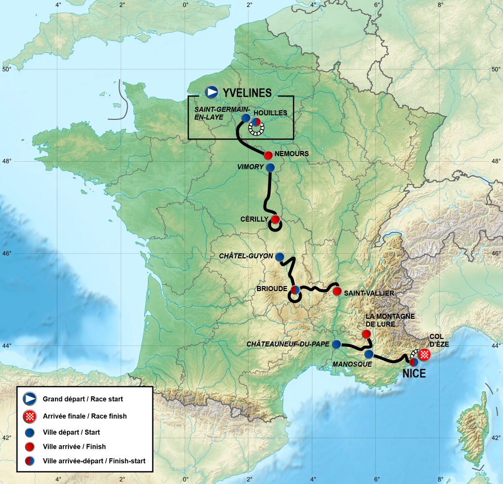 Carte Paris-Nice 2013